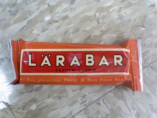 mmmmm delicious